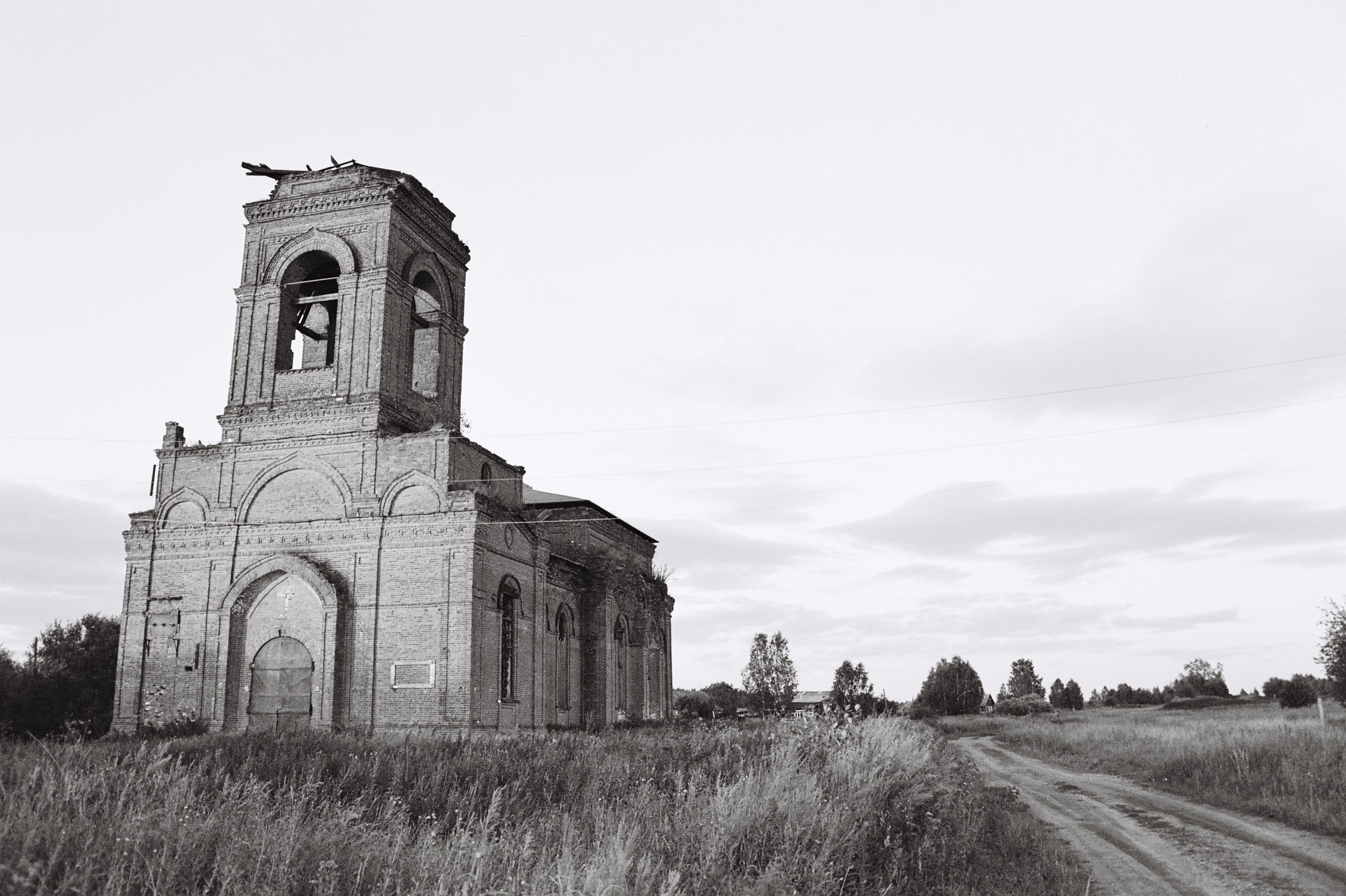 Вознесенская церковь в селе Родники